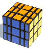 Puzzle